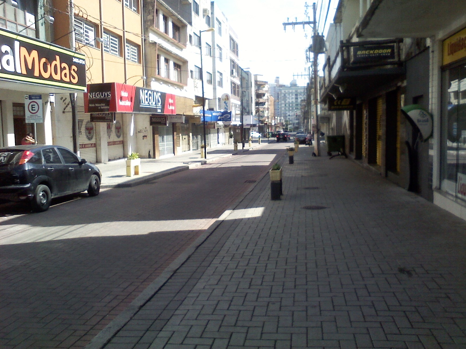 Rua Henrique Lage, Centro, Criciúma, SC, Brasil.